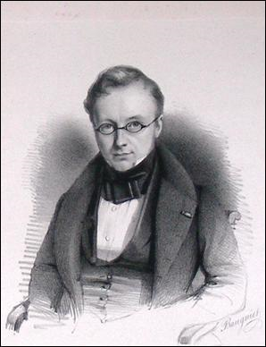 Paul Devaux, ministre belge